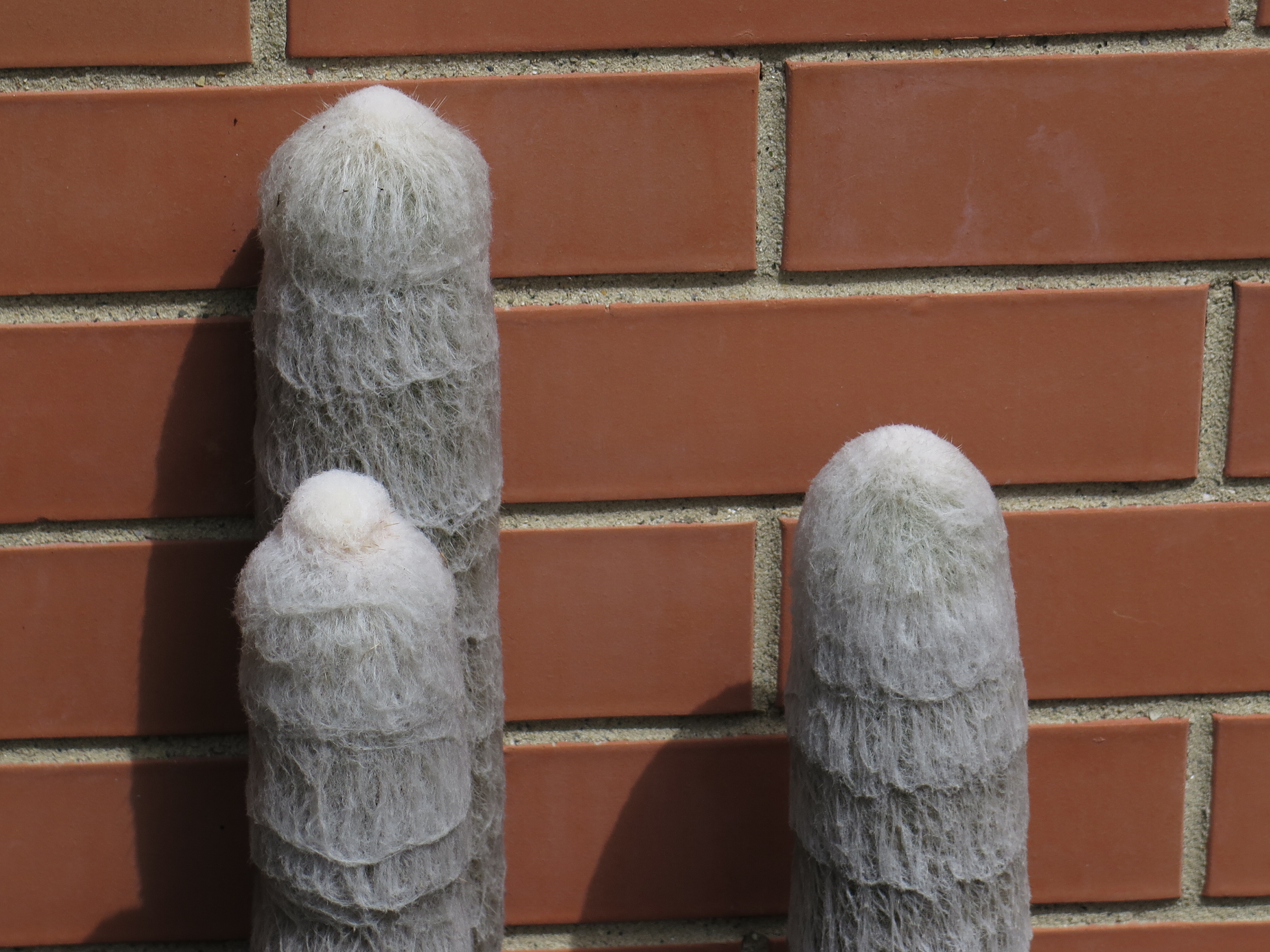 Espostoa melanostele - sono ben visibili gli anelli di crescita